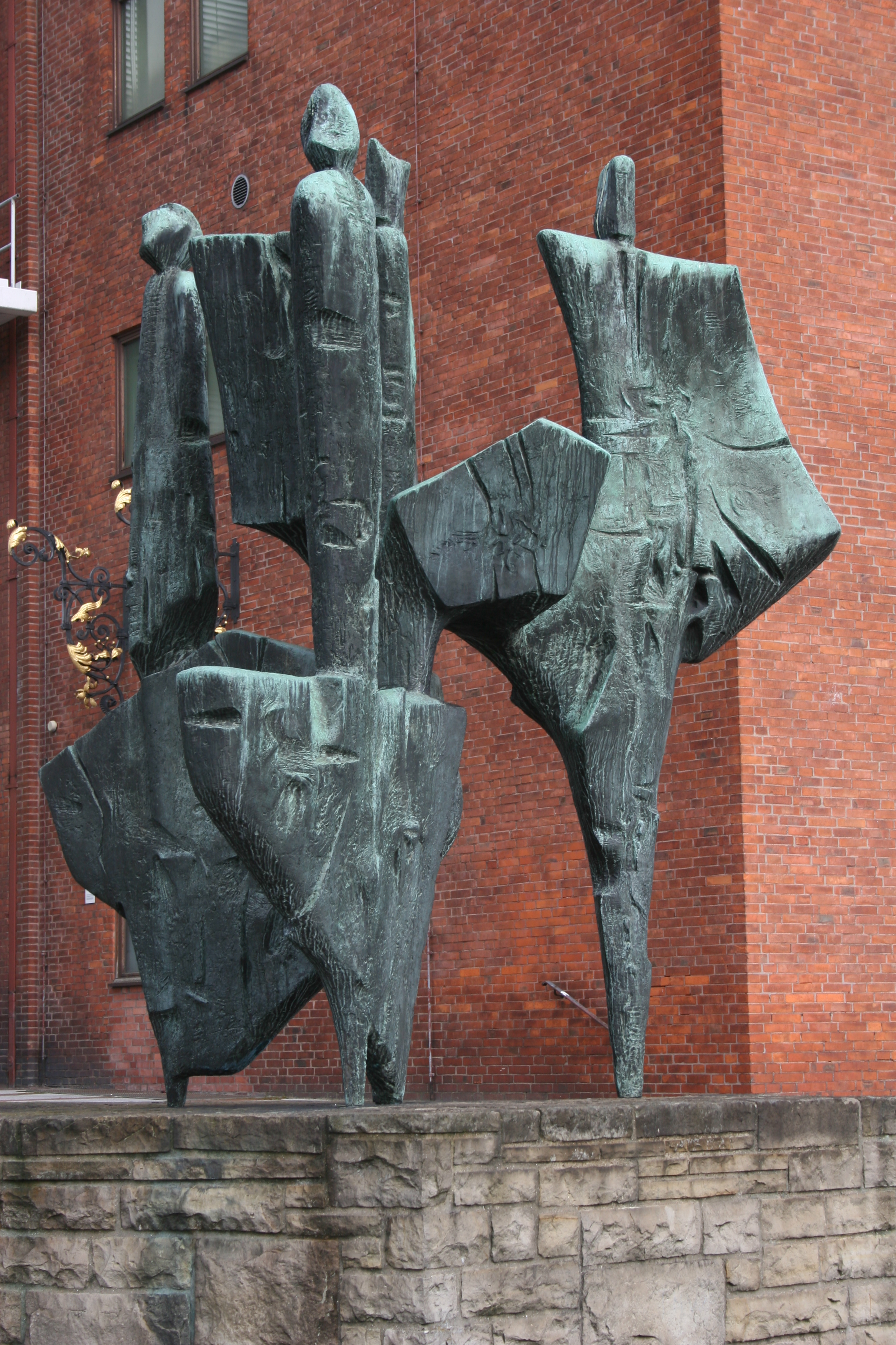 Sculpture: "Die fünf Erdteile" ("The five continents") from Bernhard Heiliger in Kiel (1961), Germany